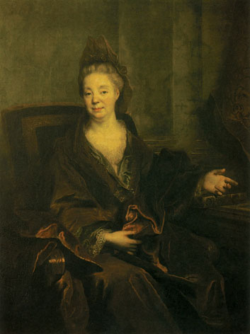 Portrait de Marguerite Bécaille, femme de l'artiste